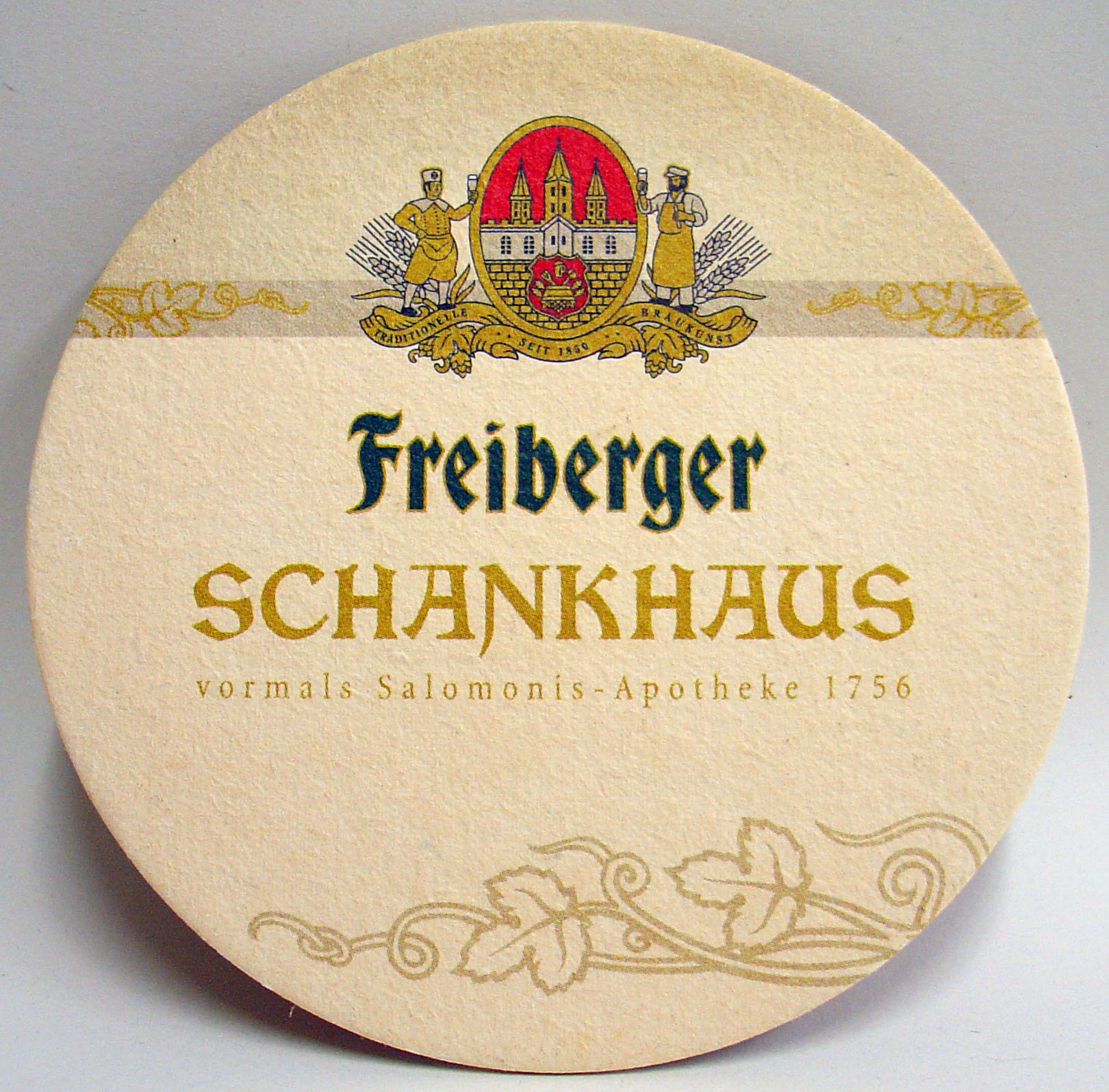 Bierdeckel des Freiberger Schankhaus des Freiberger Brauhauses am Dresdner Neumarkt